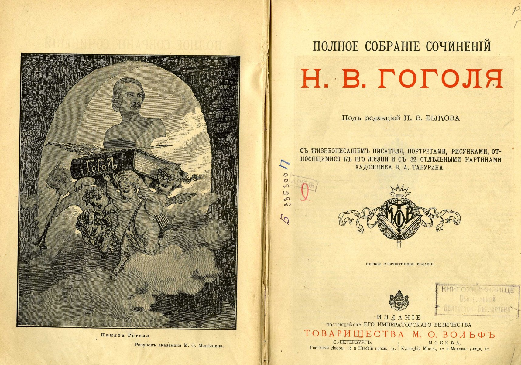 Nikolay Gogol illustrated by Vladimir Taburin